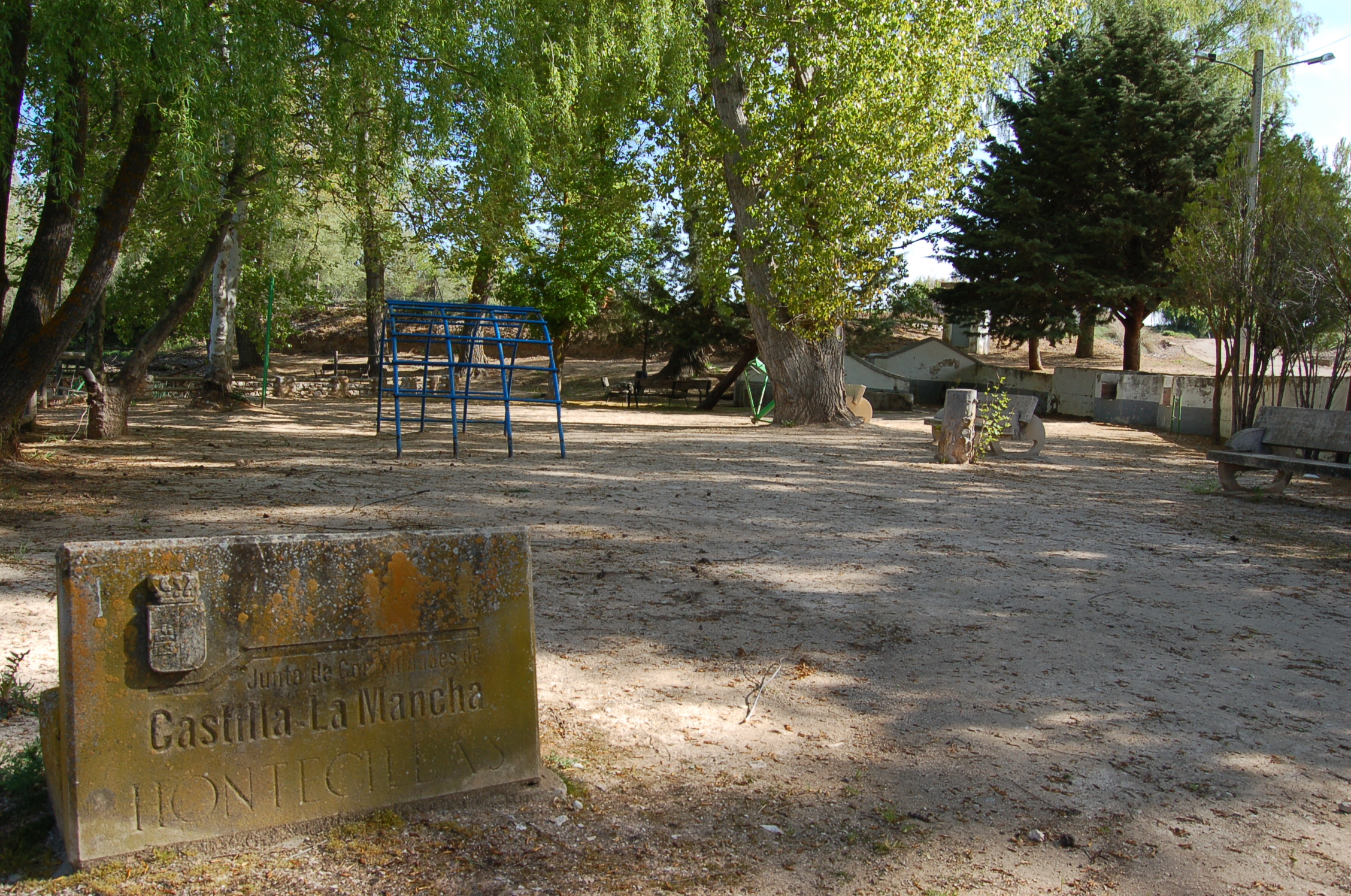 Parque del Lavadero de Hontecillas